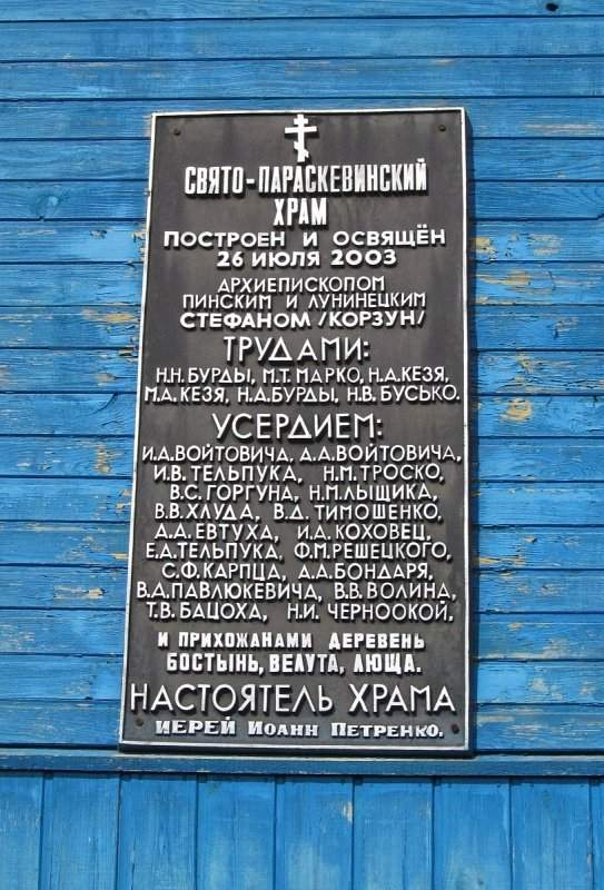 Бастынь. Свята-Параскева-Пятніцкая царква